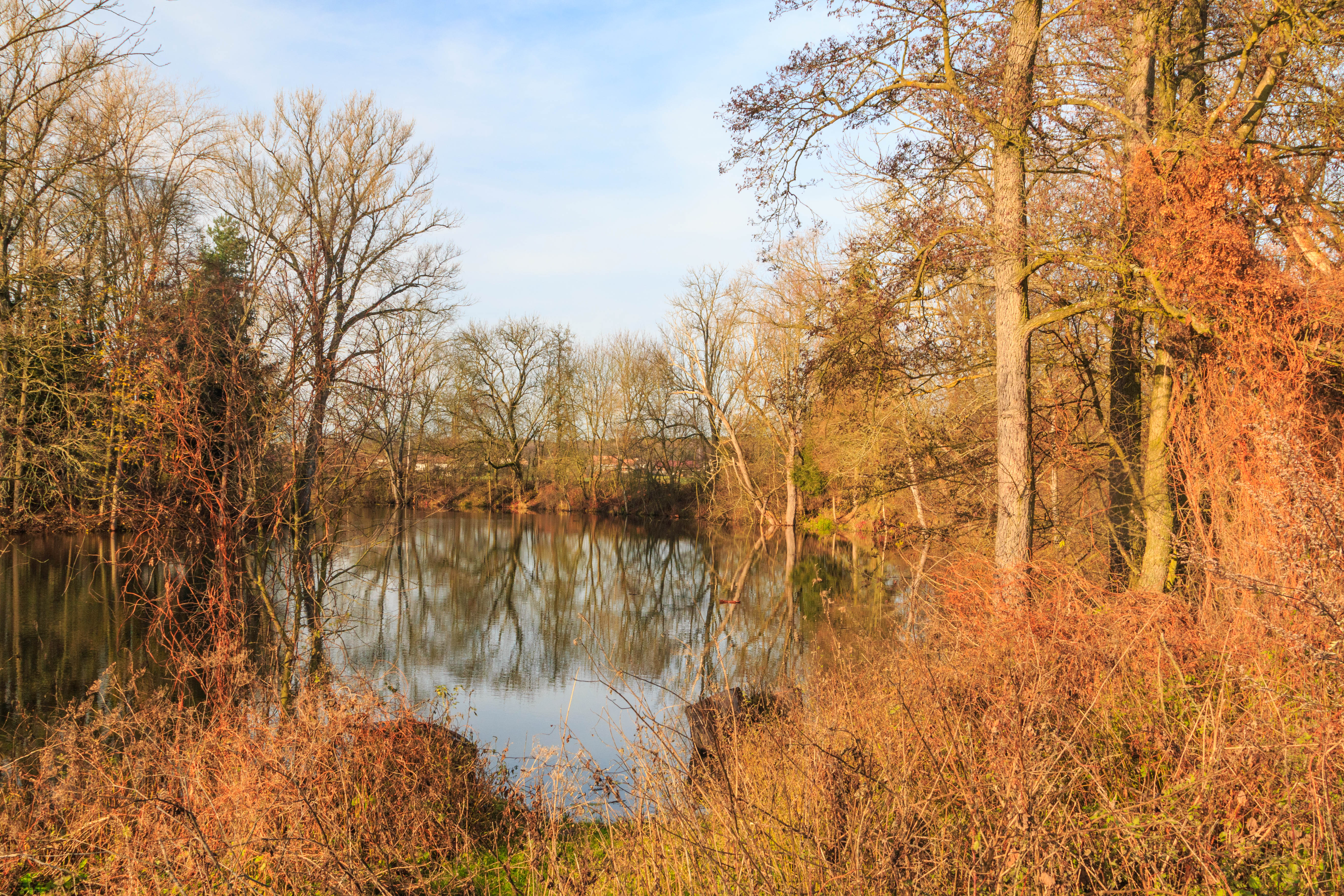 mrtvé rameno Labe - Polábek u Semína Project: Vodstvo